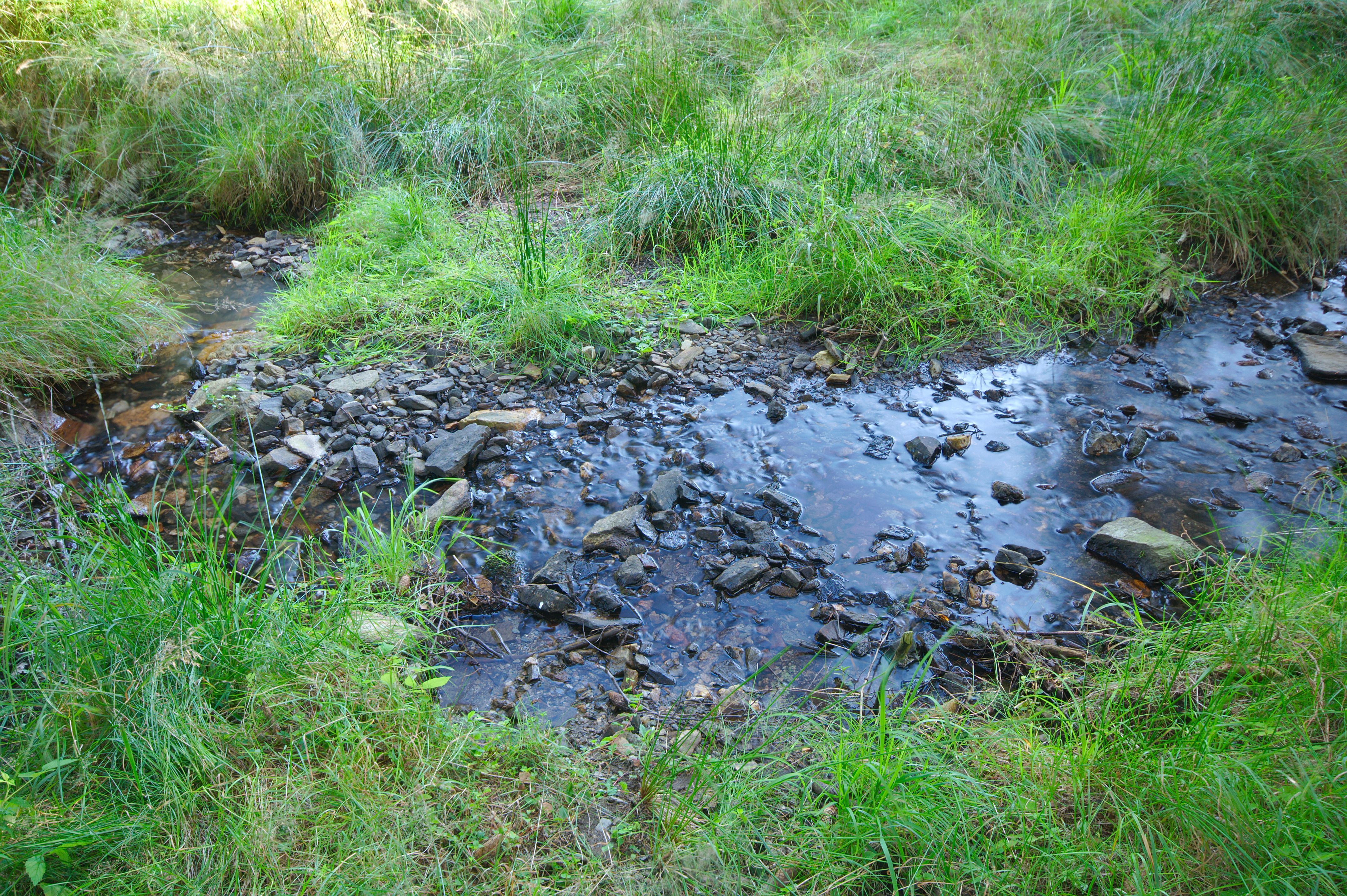 Černý potok, okres Rychnov nad Kněžnou